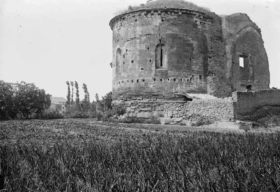 Imatge